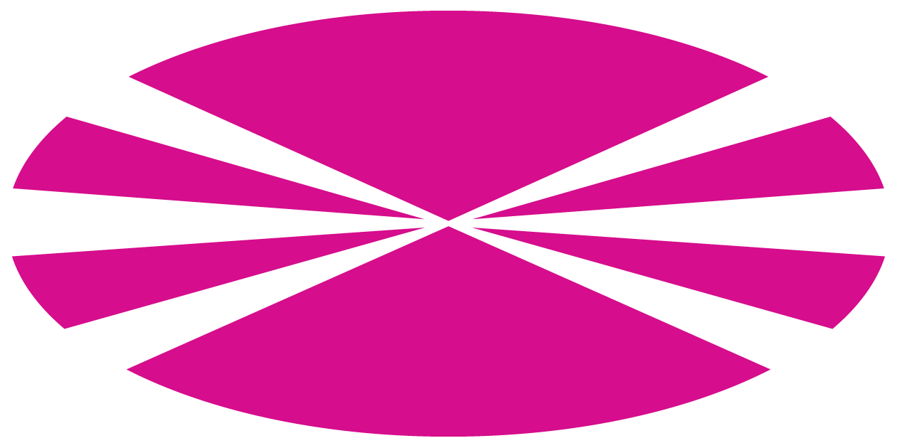 Símbolo da Universidade da Coruña